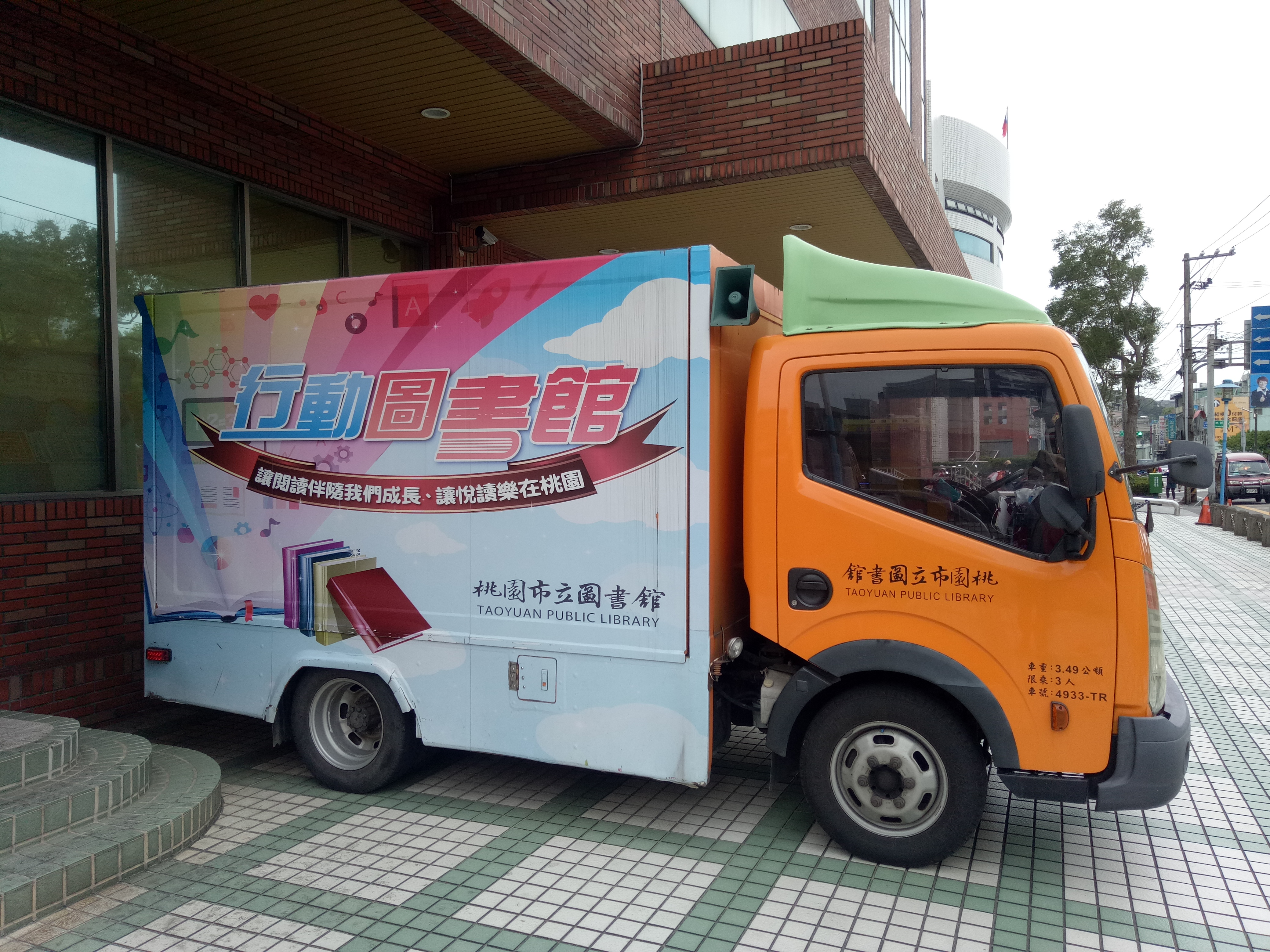 中文（台灣）: 桃園市立圖書館龜山分館前，桃園市立圖書館行動圖書車4933-TR。